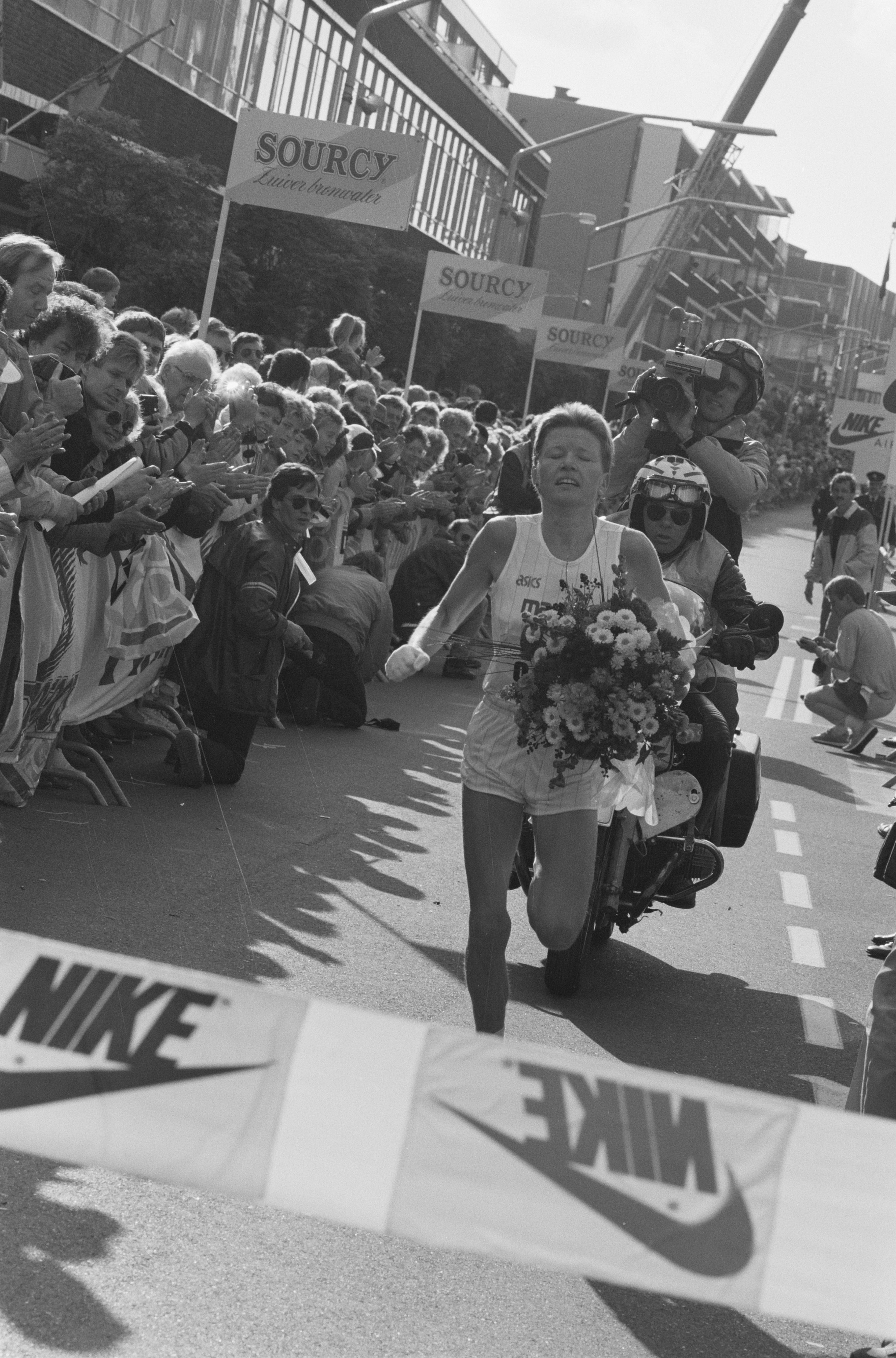 Collectie / Archief : Fotocollectie Anefo Reportage / Serie : [ onbekend ] Beschrijving : Dam tot dam-loop (16 km) finish in Zaandam; Ingrid Kristiansen gaat met bloemen over de finish Datum : 11 oktober 1987 Locatie : Noord-Holland, Zaandam, Zaanstad Trefwoorden : BLOEMEN, atleten Persoonsnaam : Ingrid Kristiansen Fotograaf : Bogaerts, Rob / Anefo Auteursrechthebbende : Nationaal Archief Materiaalsoort : Negatief (zwart/wit) Nummer archiefinventaris : bekijk toegang 2.24.01.05 Bestanddeelnummer : 934-0989